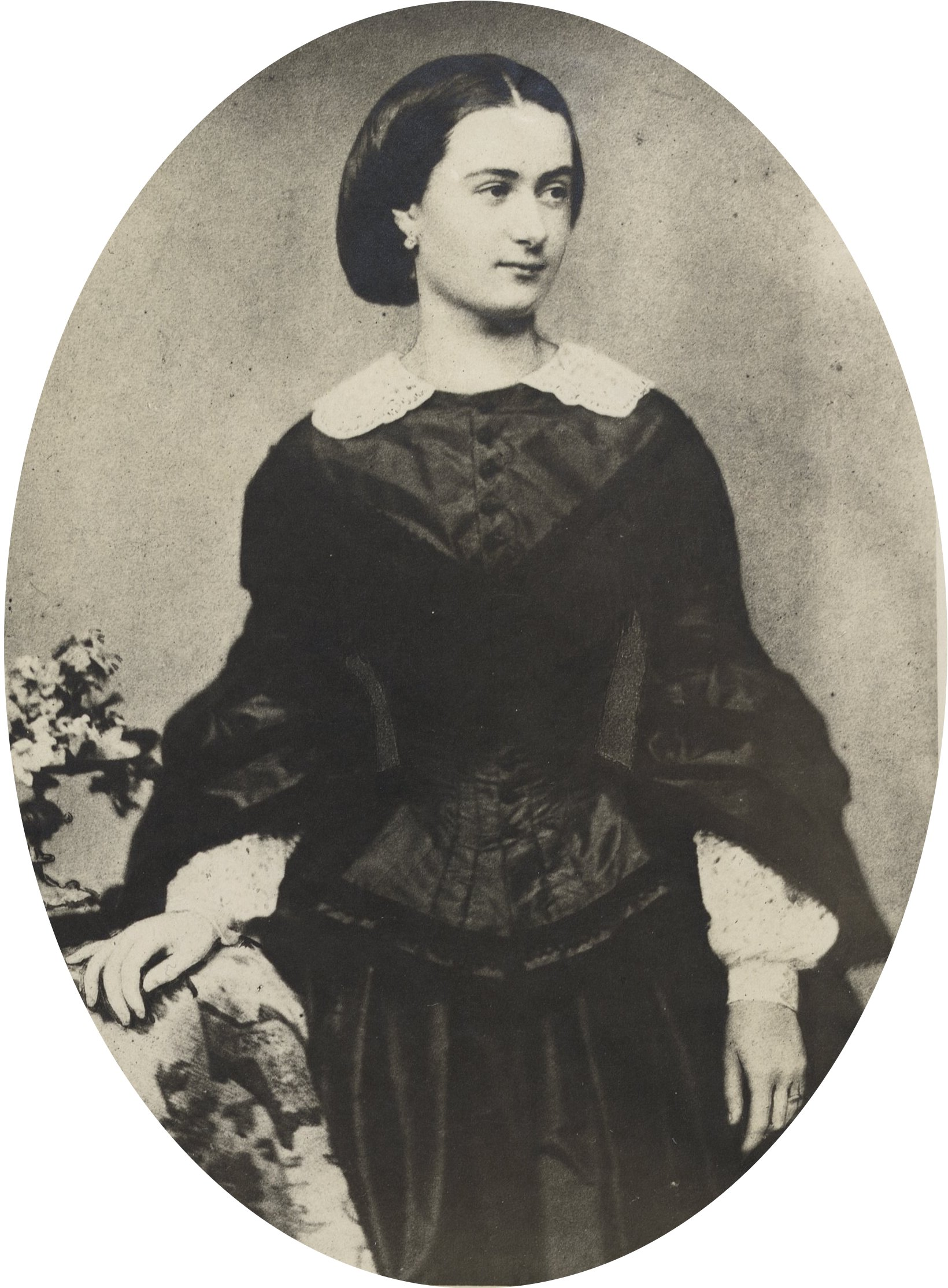 Auguste Escher, Frau von Alfred Escher